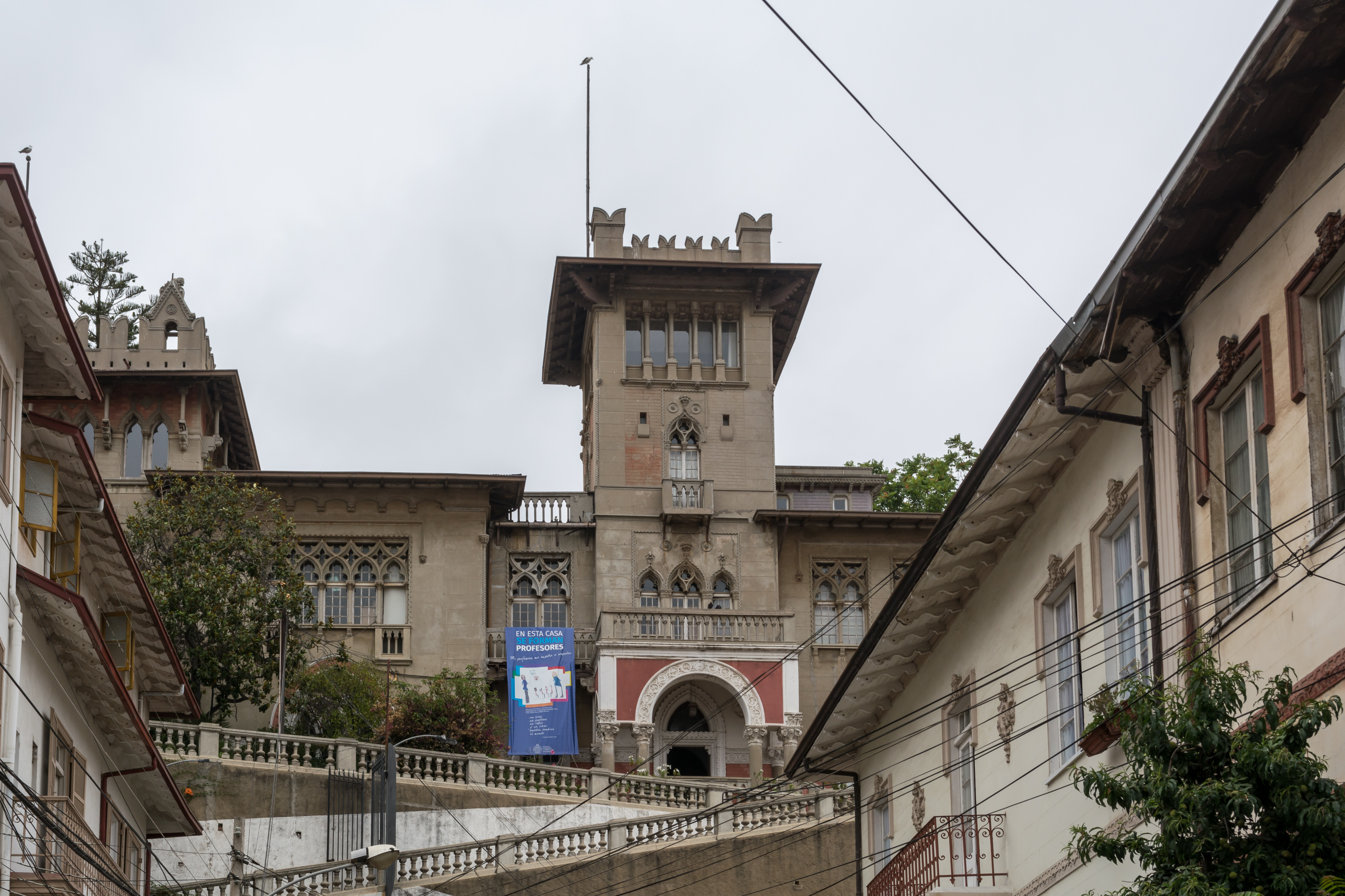 Palacio Valle, Viña del Mar, Región de Valparaíso, Chile